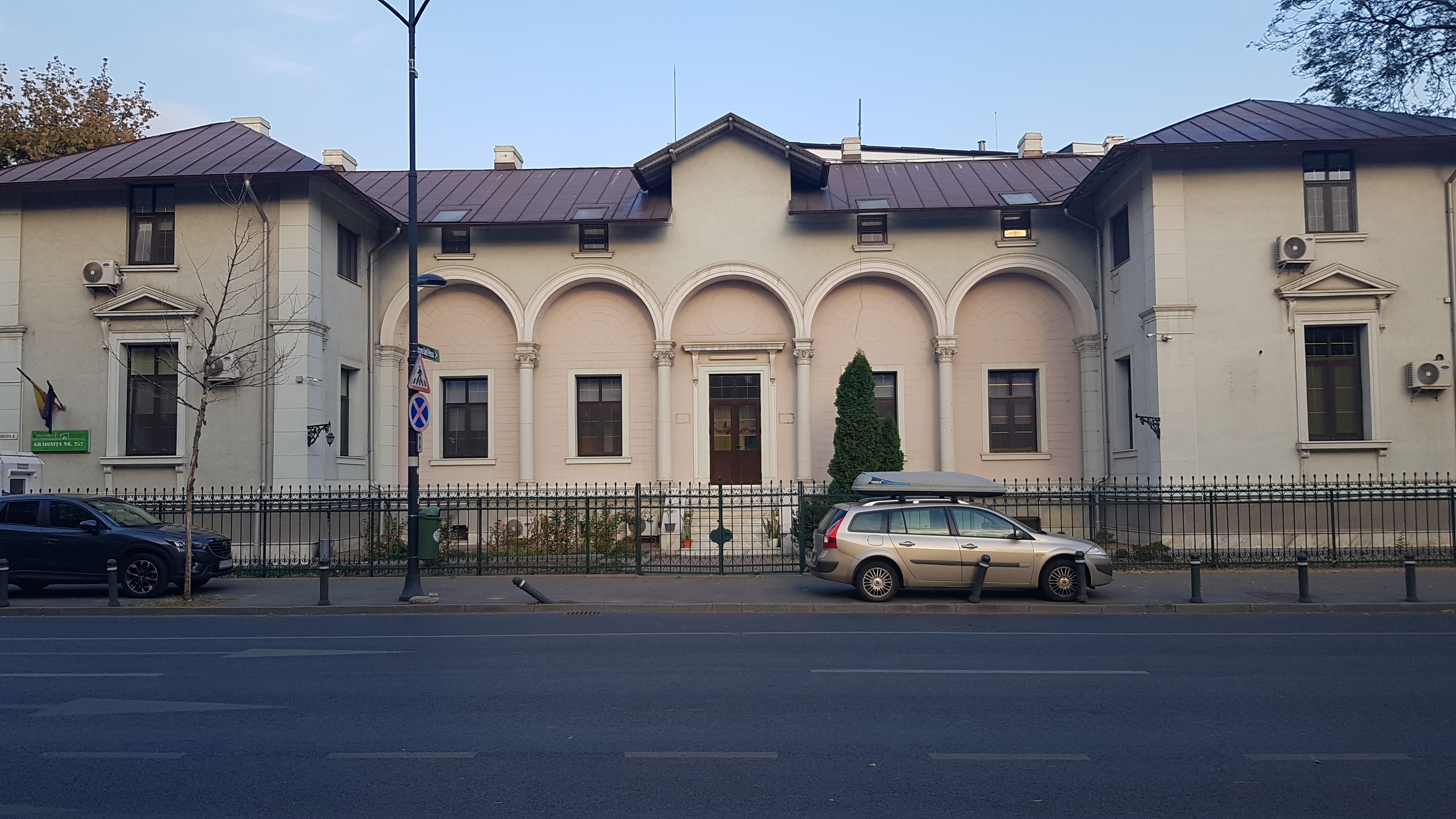 Casa Slătineanu